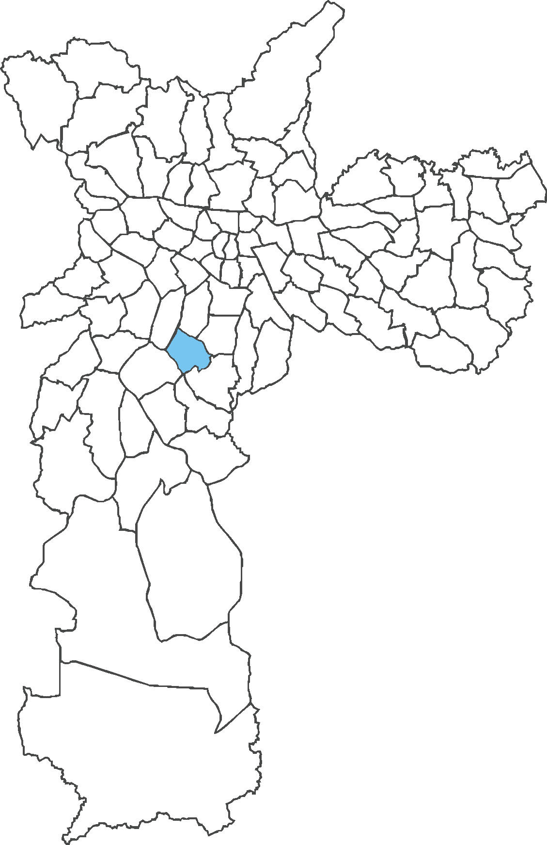 Localização do distrito de Campo Belo no município de São Paulo.